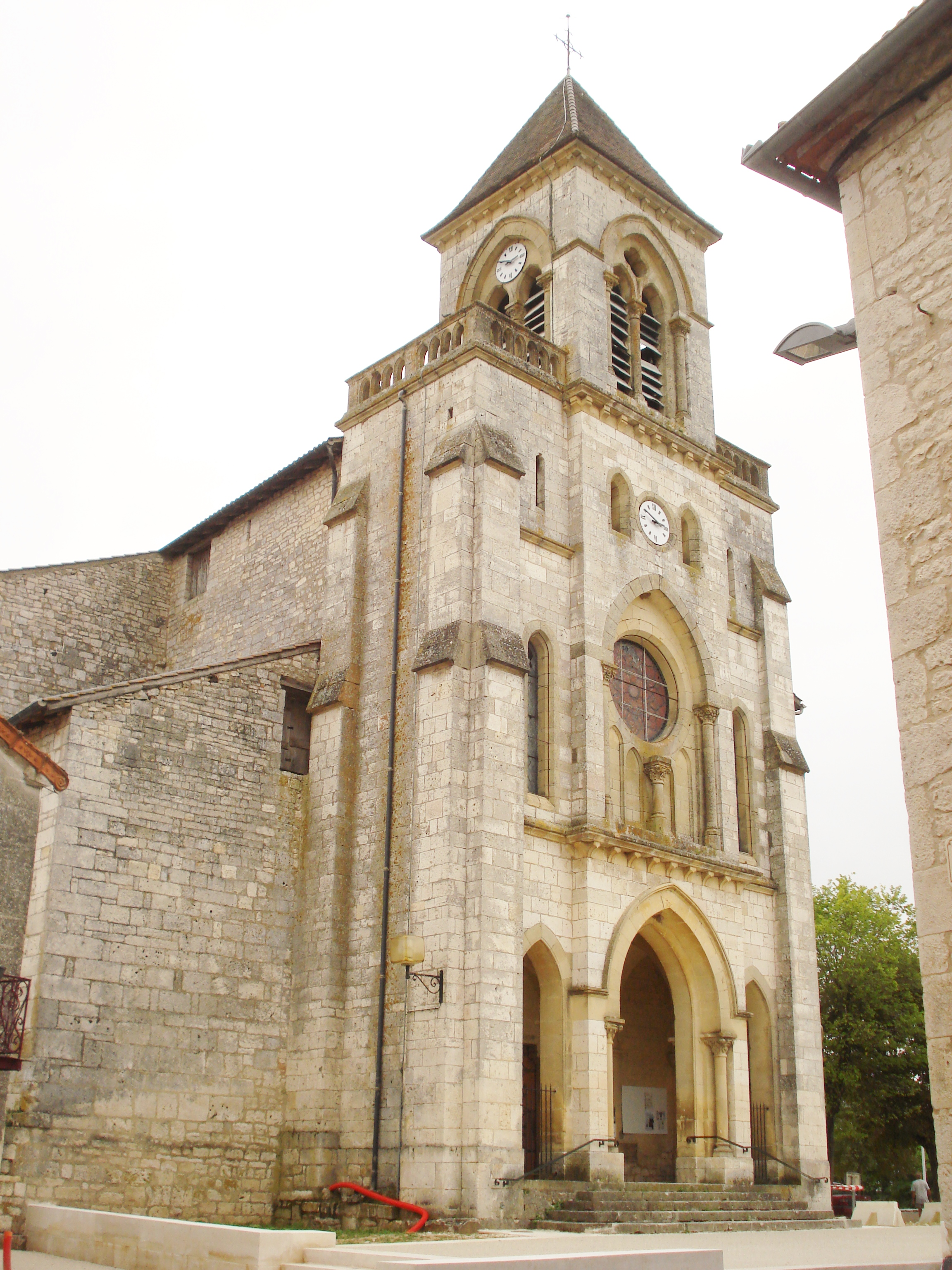 L'église Saint-Quirin de Lalbenque